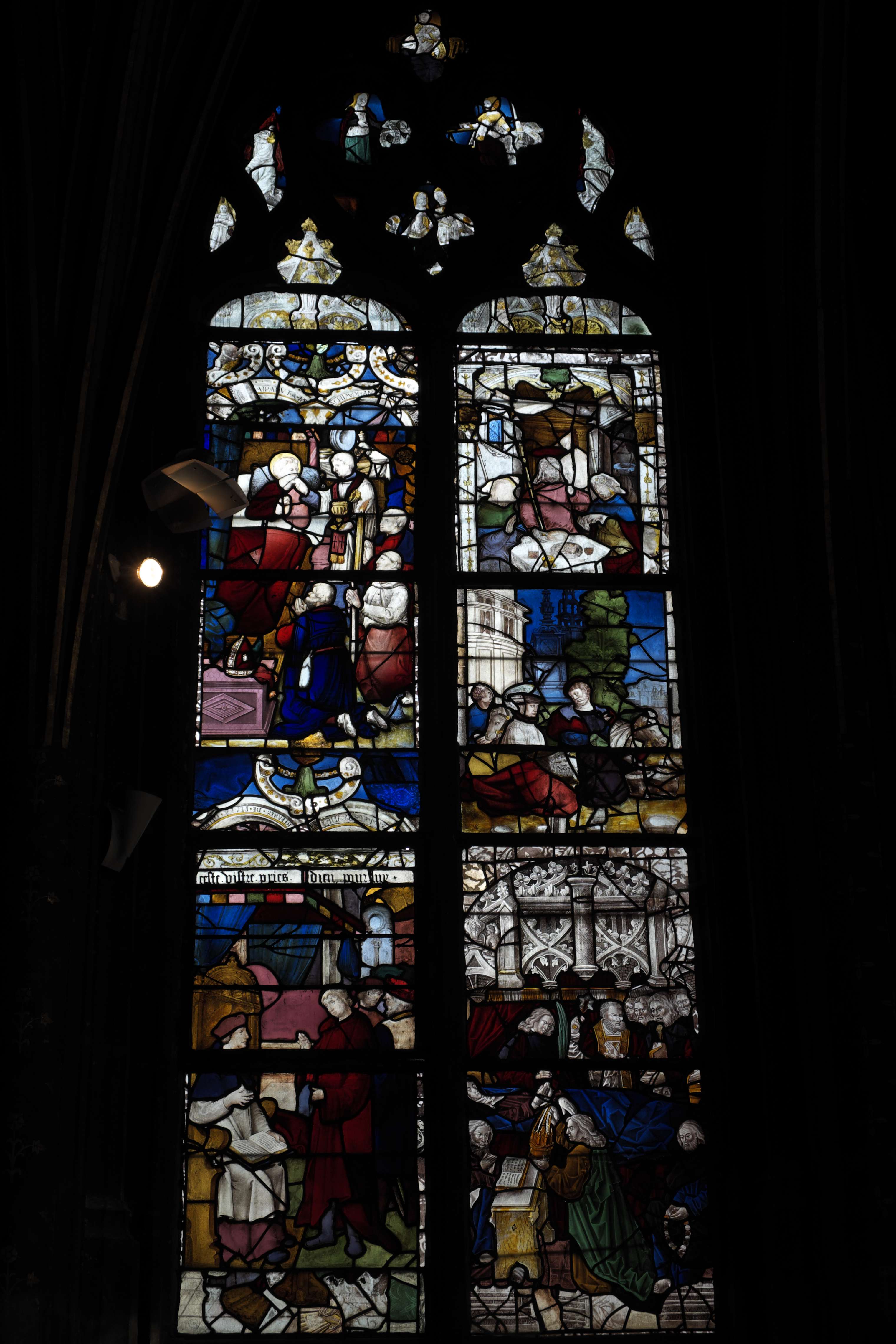 Katholische Kirche Saint-Pierre in Dreux im Département Eure-et-Loir (Centre-Val de Loire/Frankreich), Bleiglasfenster (baie 3) mit Fragmenten unterschiedlicher Herkunft im Chor; Darstellung: Emmausjünger (oben rechts), Marientod (unten rechts)